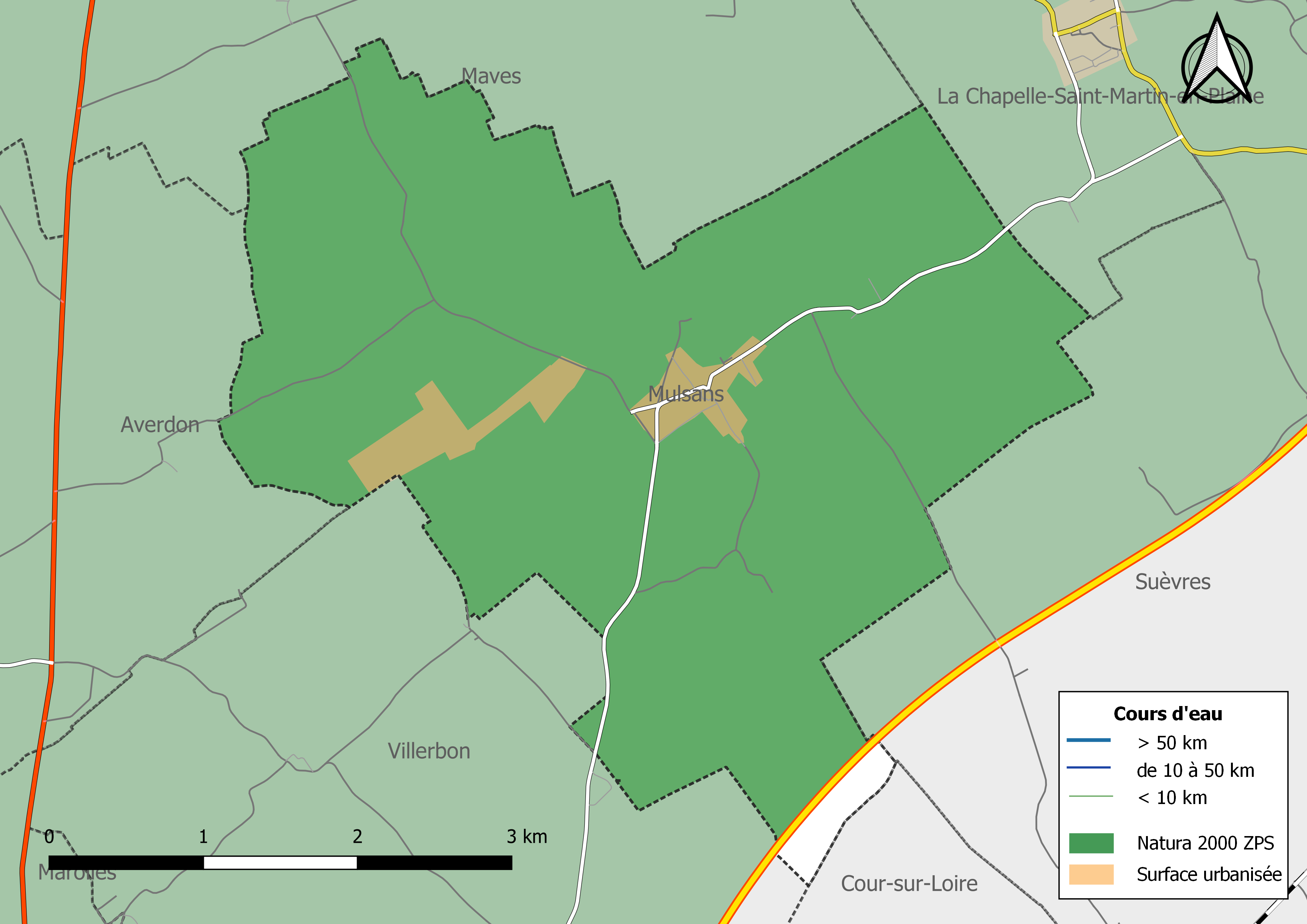 Carte des zones Natura 2000 de type ZPS de la commune de Mulsans (France).